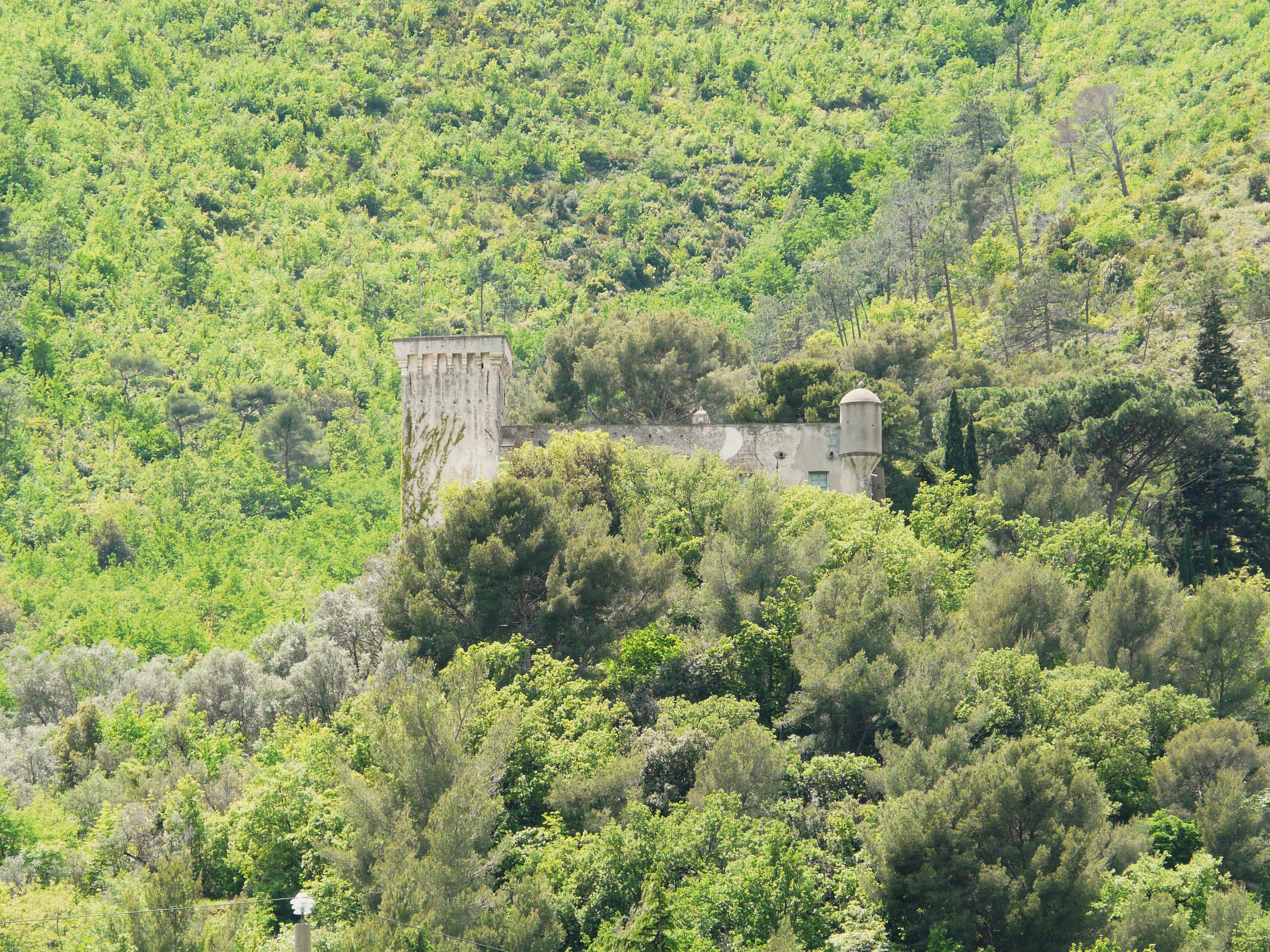 Castello di Conscente, Cisano sul Neva, Liguria, Italia